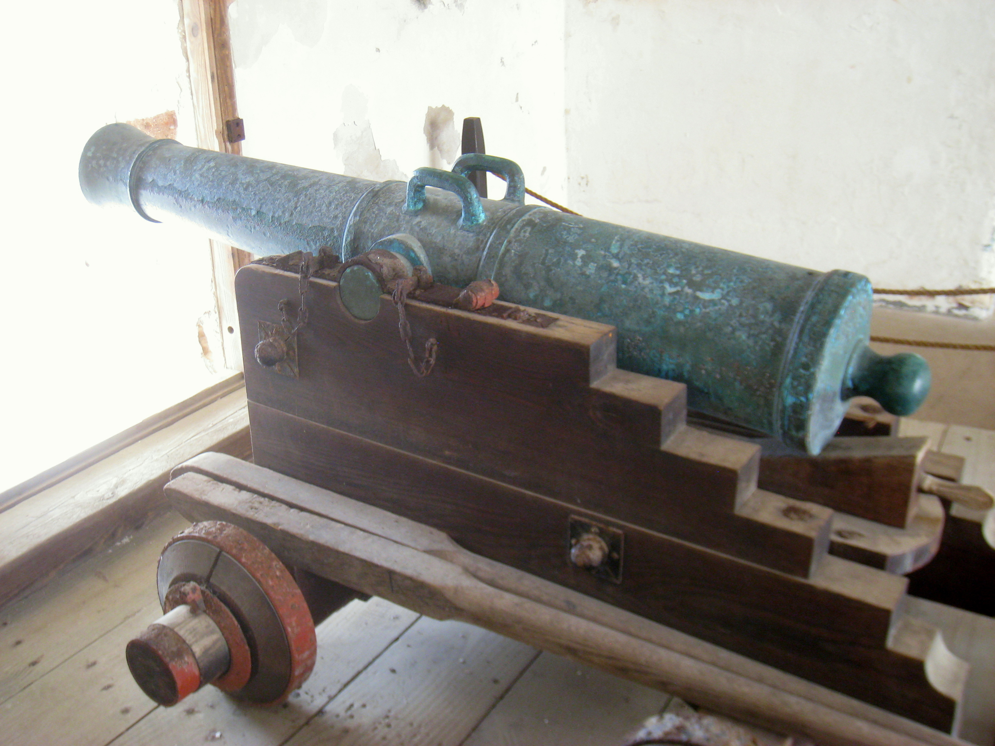 Fort San Felipe del Morro, San Juan, Puerto Rico.